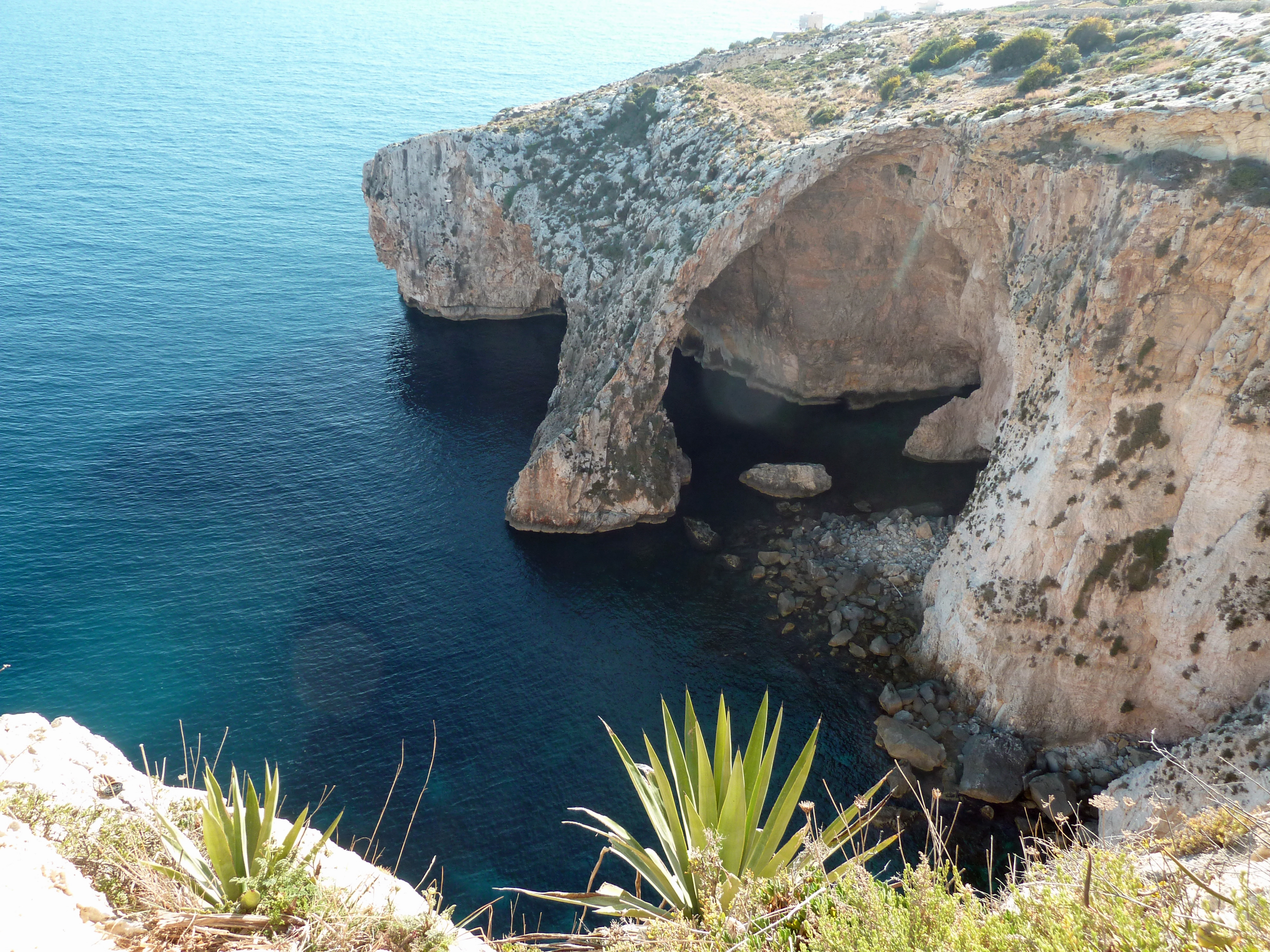 Elle est située au sud de l'ile près de Zurrieq